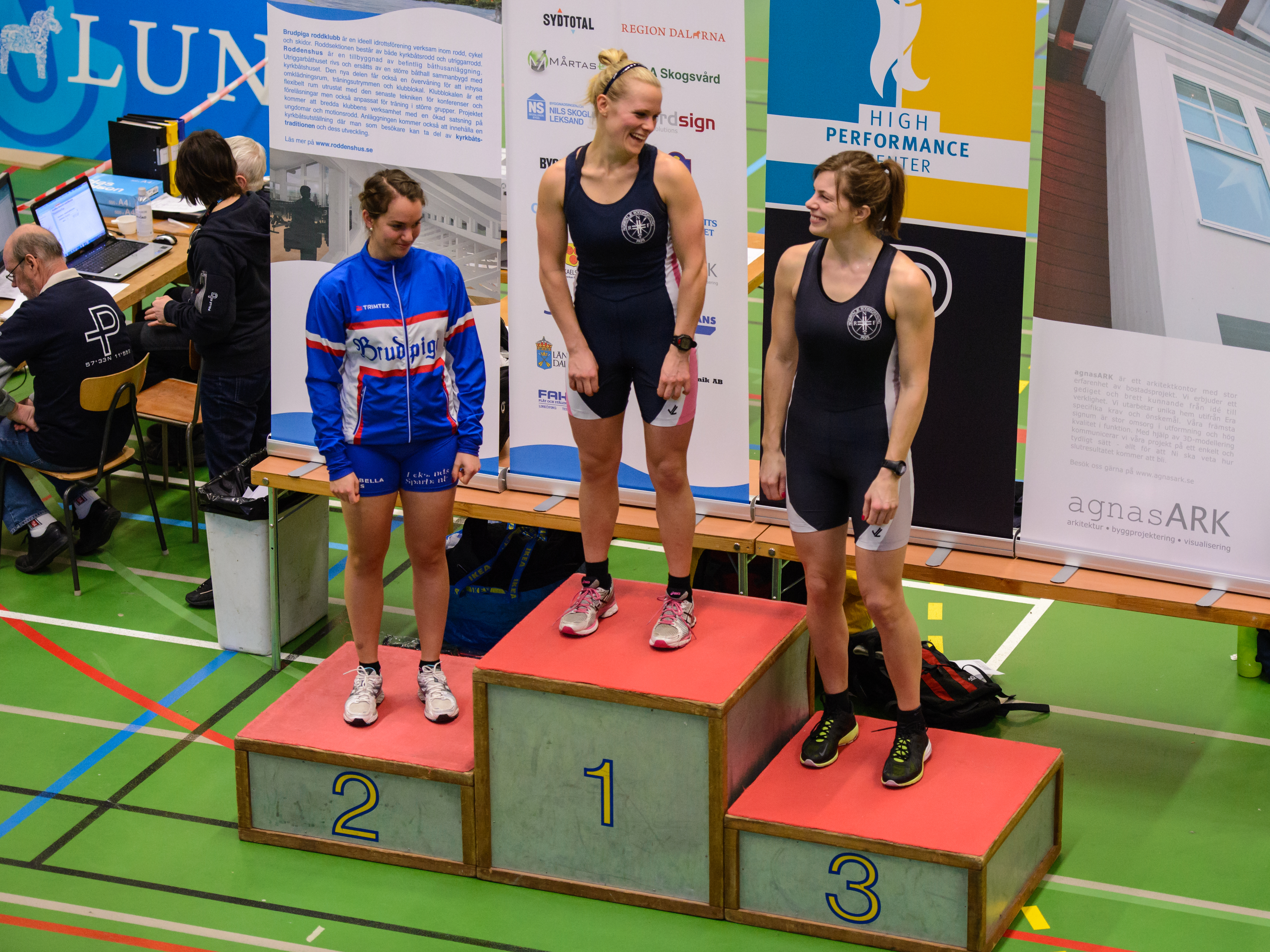 SM i rodd (inomhus), första gången grenen har SM-status. Prisutdelning för damernas 2 000 m. Anna-Malvina Svennung (Norrtälje RF) vann, följd av Isabella Niss (Brudpiga RK) och Britta Pivac (Norrtälje RF).